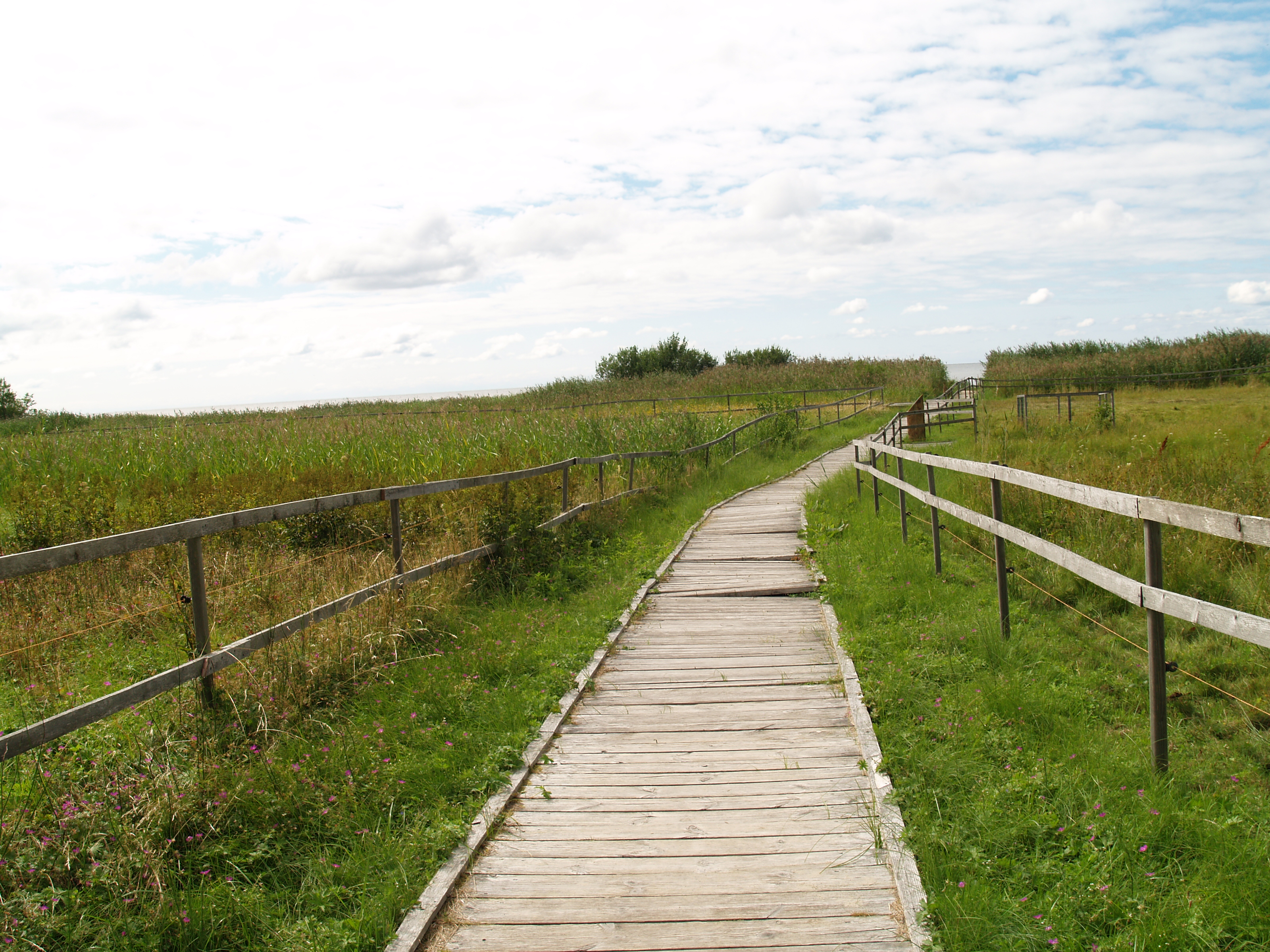 Laudtee Kabli looduskaitsealal.